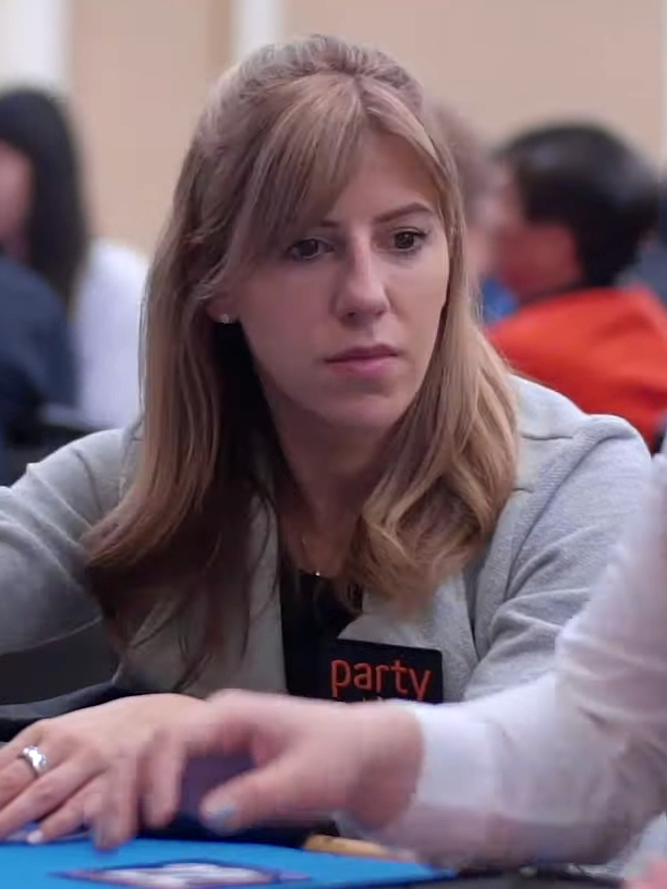 Kristen Bicknell beim L.A. Poker Classic